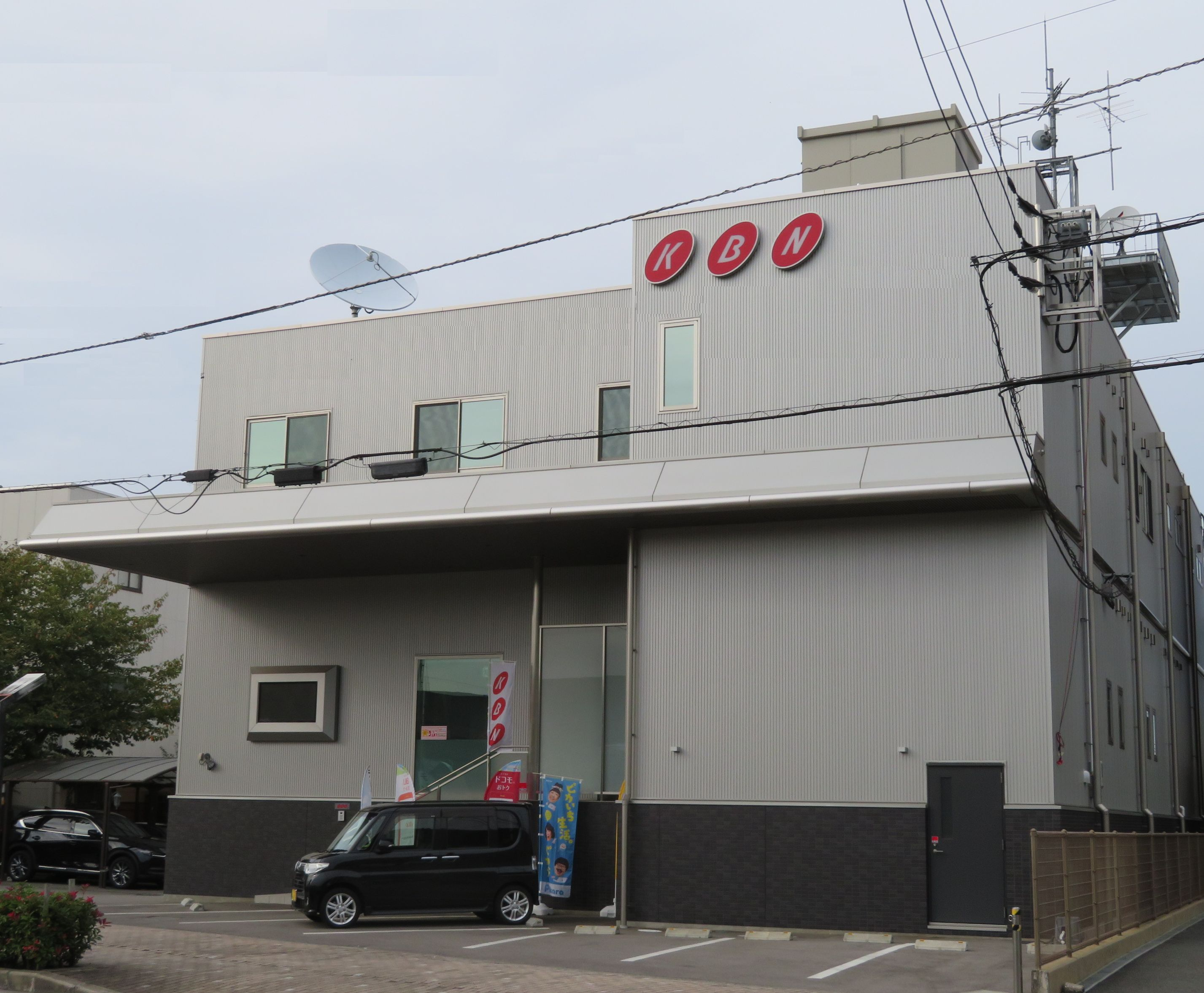 香川テレビ放送網